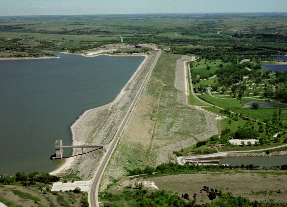 Tuttle Creek dam and reservoir in Kansas. View from west.